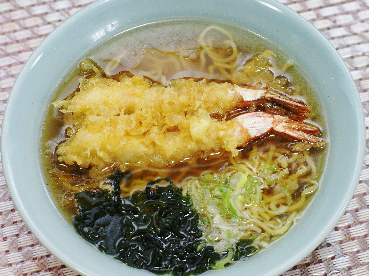 北海道後志地方で食される天ぷらラーメン